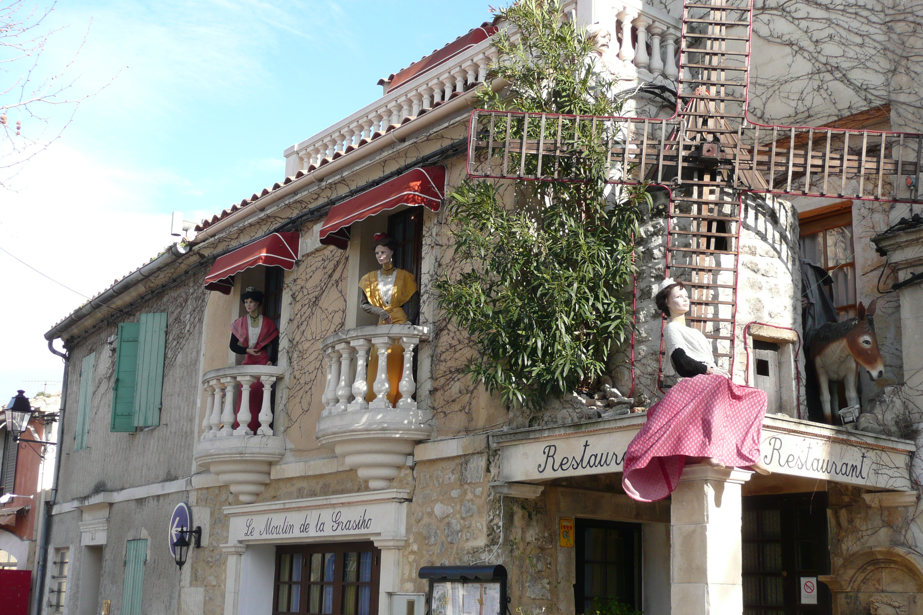 43°43′36.6″N 4°42′39.3″E / 43.726833°N 4.710917°E